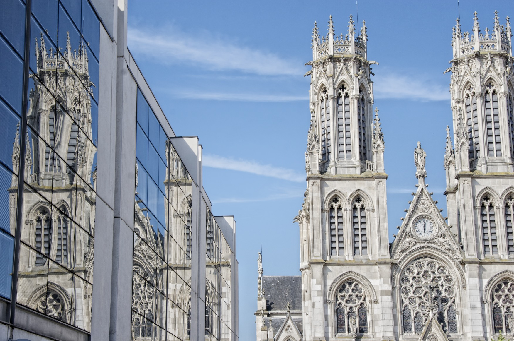 Vue de l'église Saint-Léon de Nancy du parvis de la gare du même nom